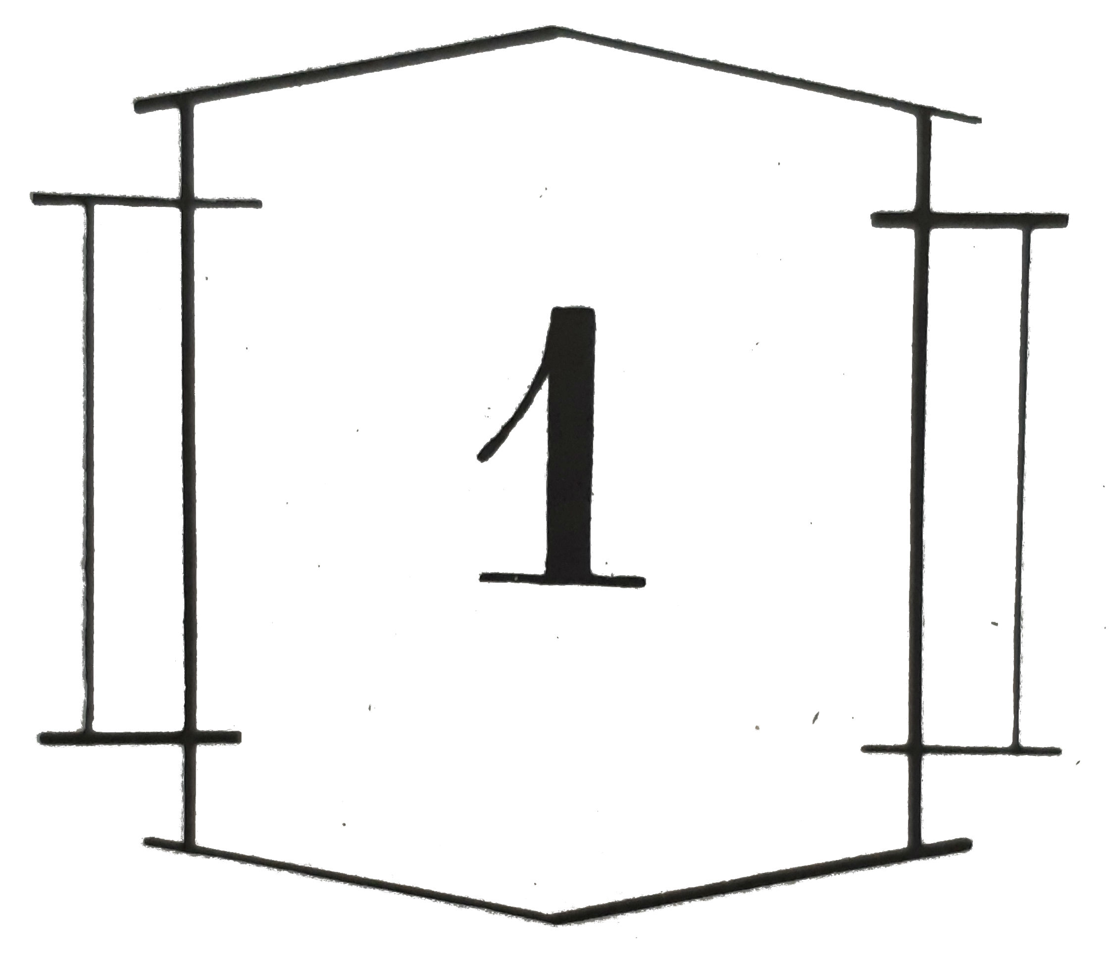 [ტ.] 1 - ქართული საბჭოთა ენციკლოპედია